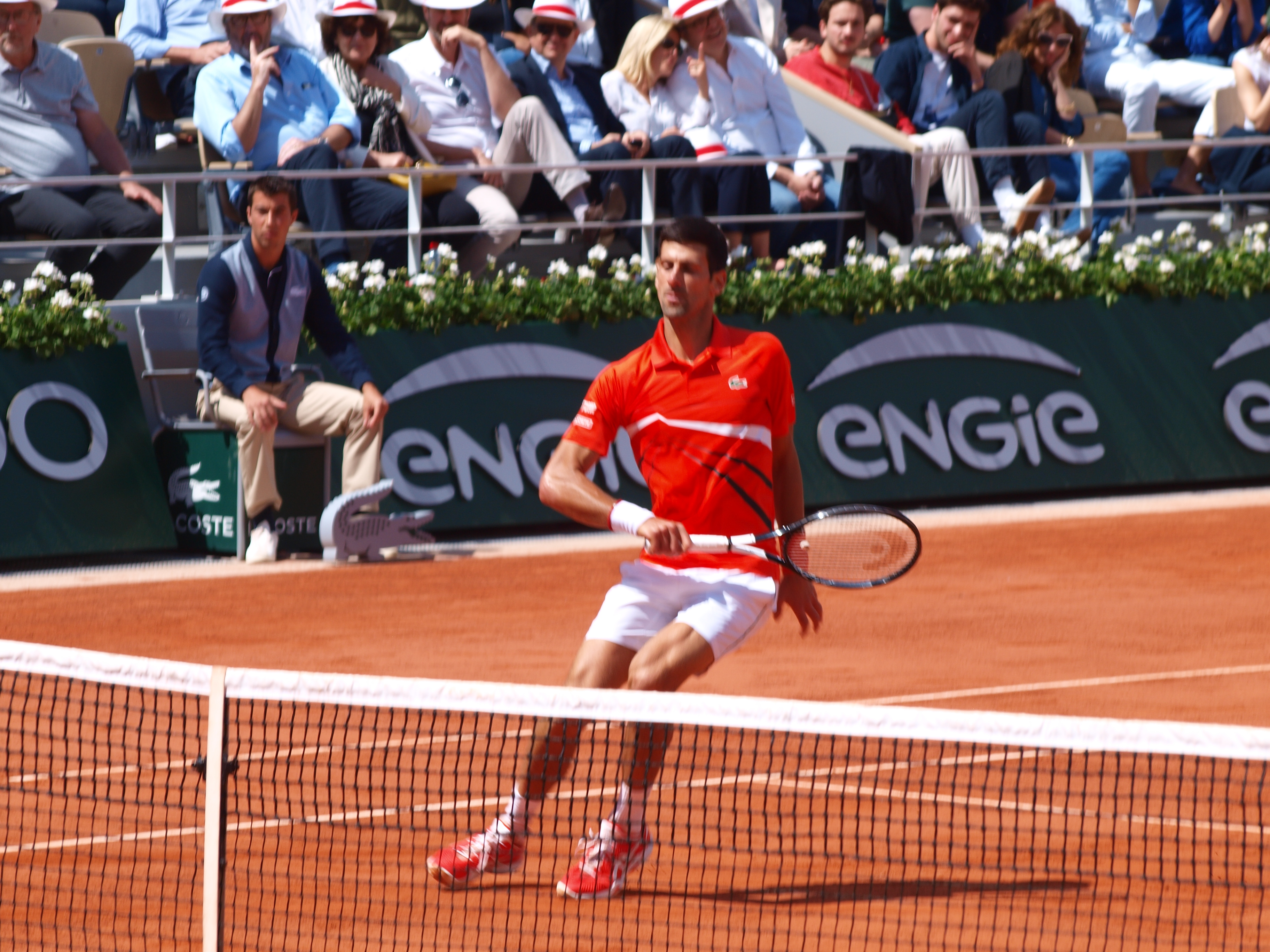 Internationnaux de France de Tennis 2019, au stade Roland Garros de Paris (France), sur le court Philippe-Chatrier rénové; huitième de finale simple-hommes entre N. Djocovic & A. Zverev, le jeudi 6 juin 2019 -- Là, il s'agit du joueur Yougoslave Novak Djokovic (alias Novak Đoković)